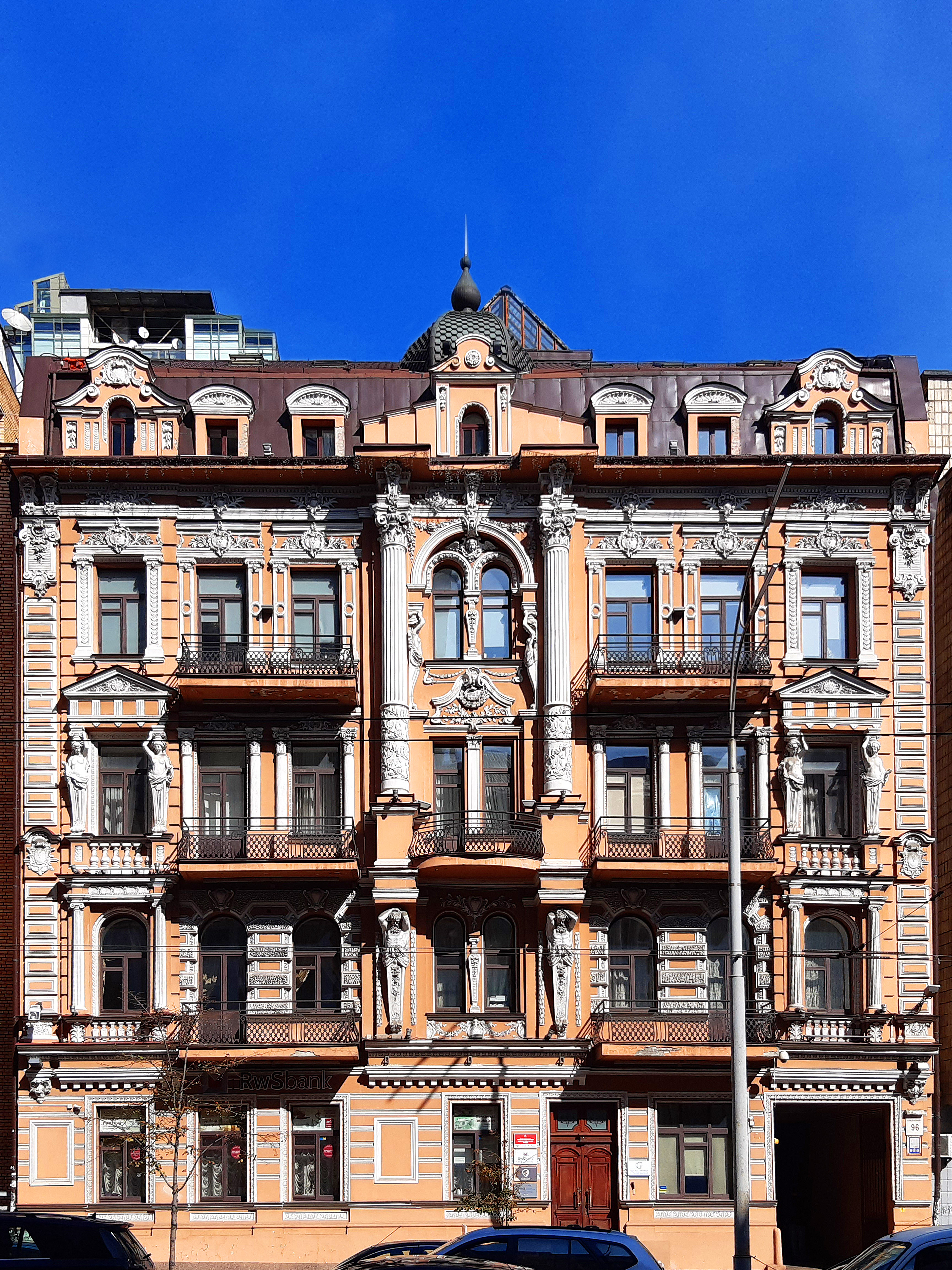 Будинок Клуга, вул. Саксаганського, 96, Київ